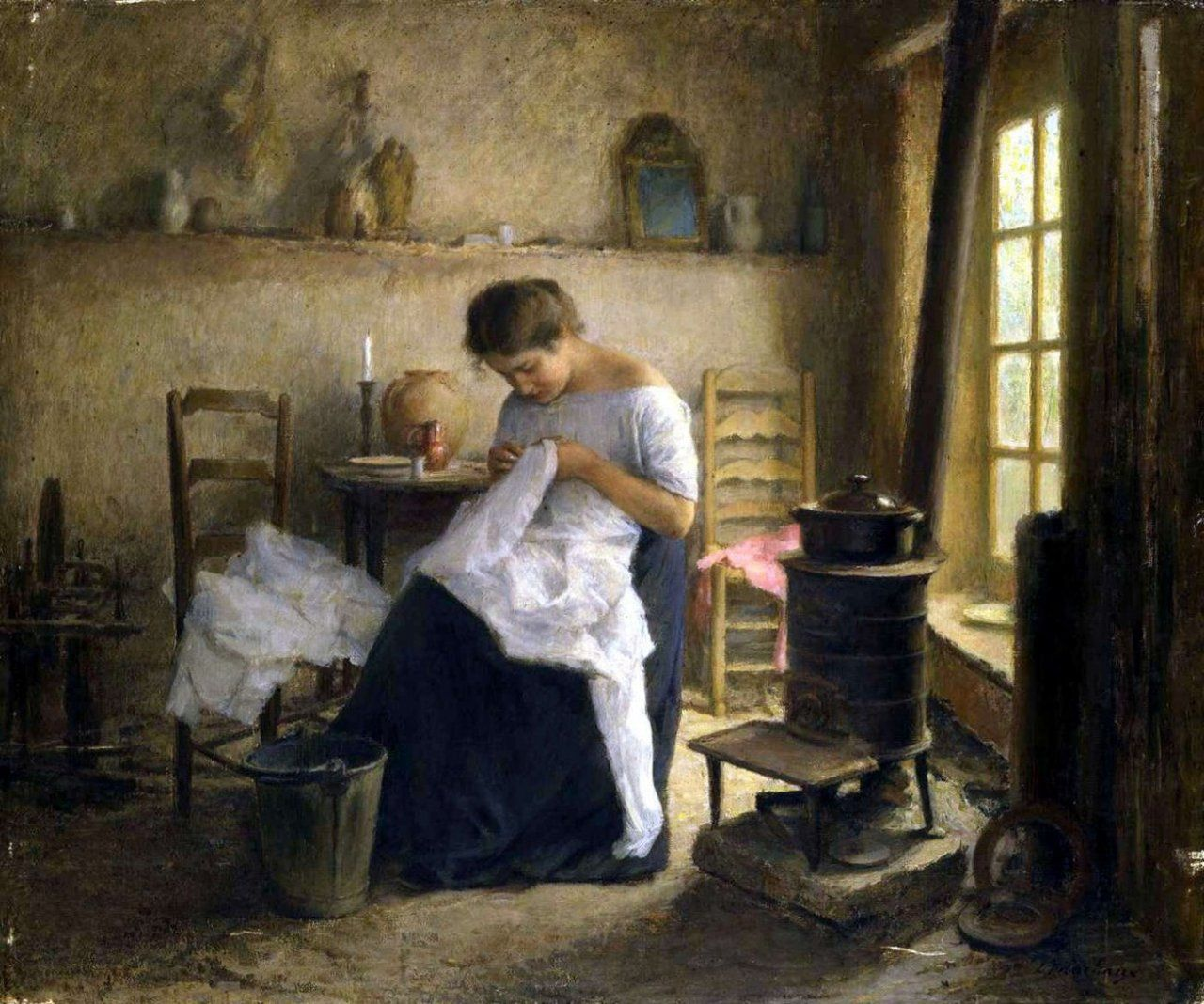 Couturière